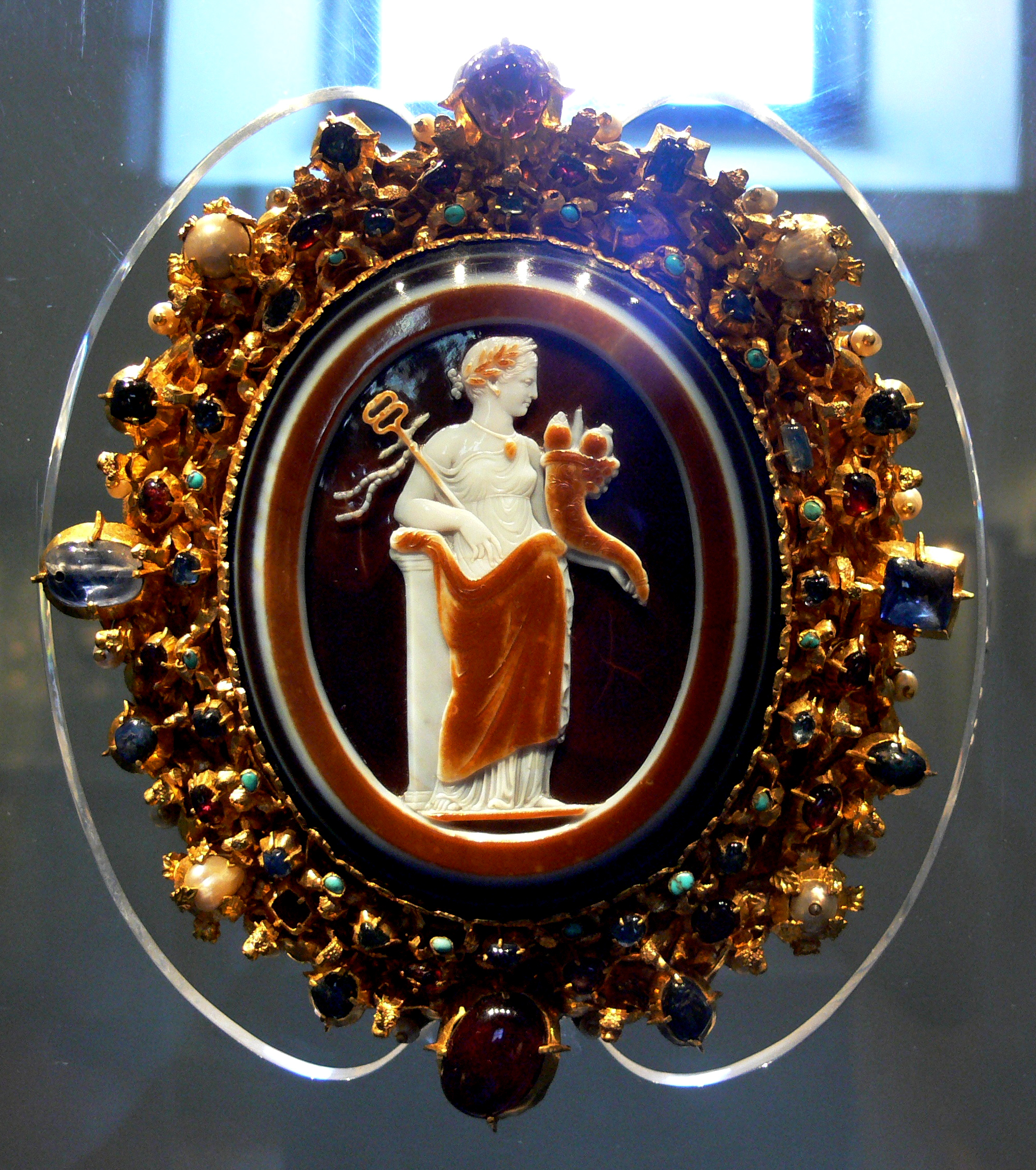 Schaffhausen, Museum zu Allerheiligen, Schatzkammer „Onyx von Schaffhausen“, römische Gemme unbekannter Herkunft (gedeutet als Personifikation des Friedens in Gestalt der Livia Drusilla, Gattin des Augustus), in Gold gefasst im 13. Jahrhundert n. Chr. (oberrheinische Arbeit), Inv. Nr. 16375